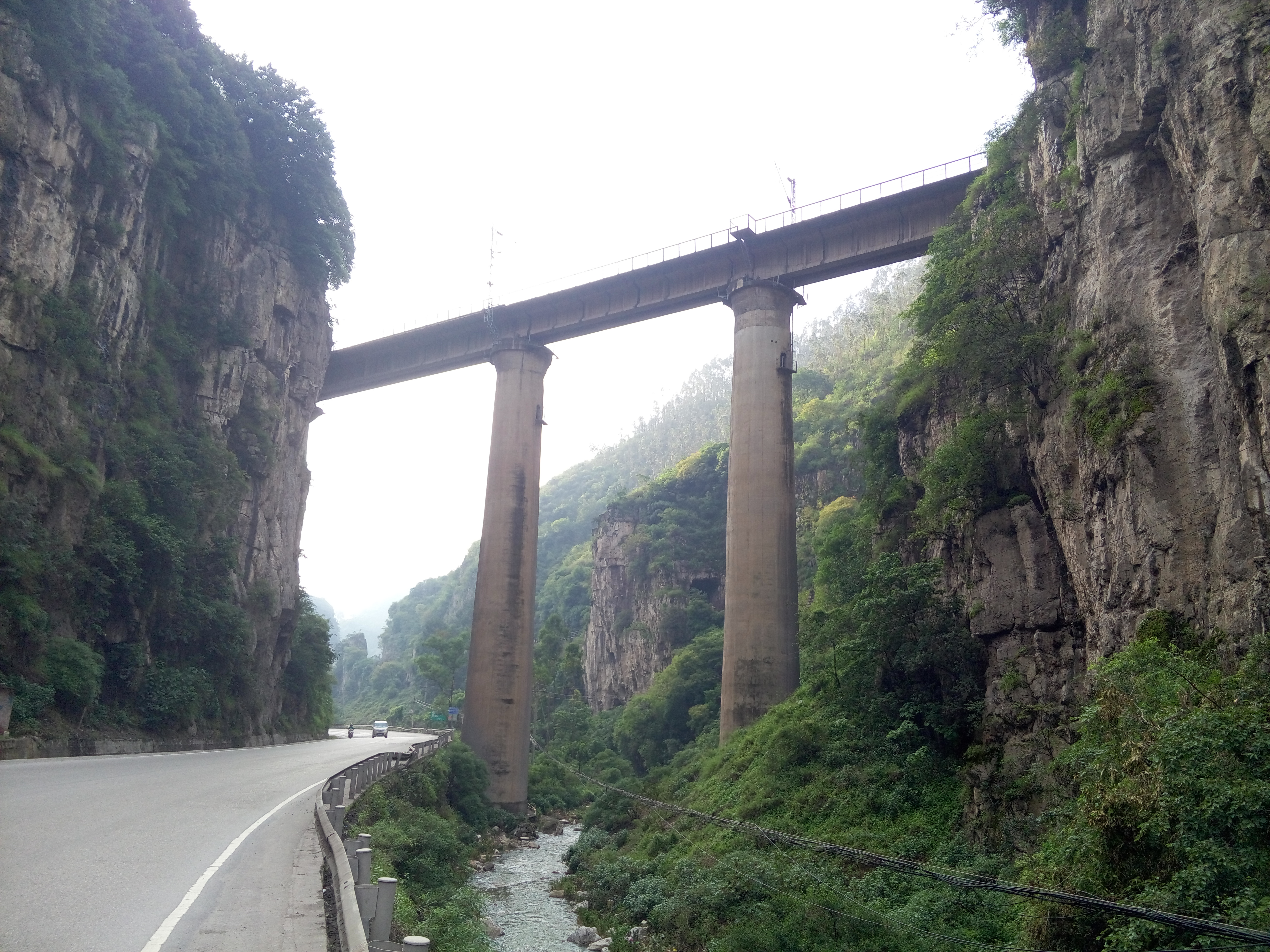 中文（中国大陆）: G324国道宜良段